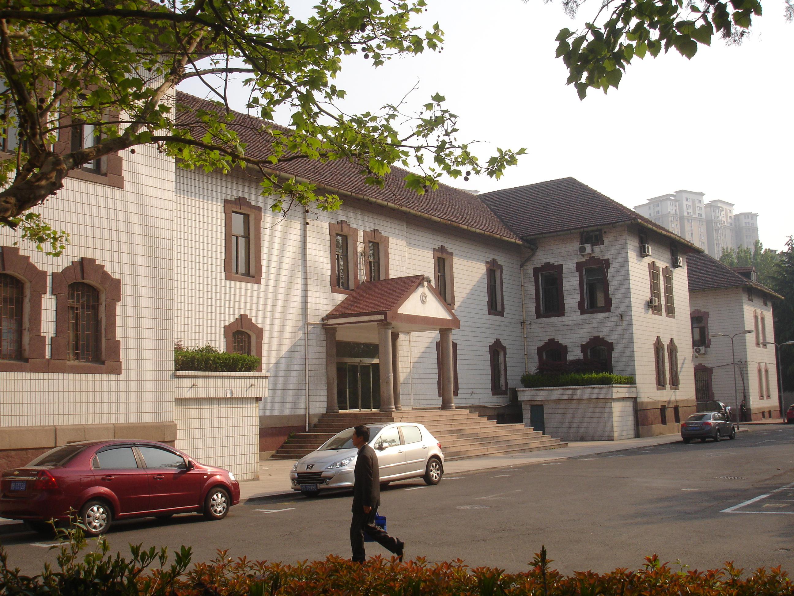 青岛毛奇兵营II号营房北侧